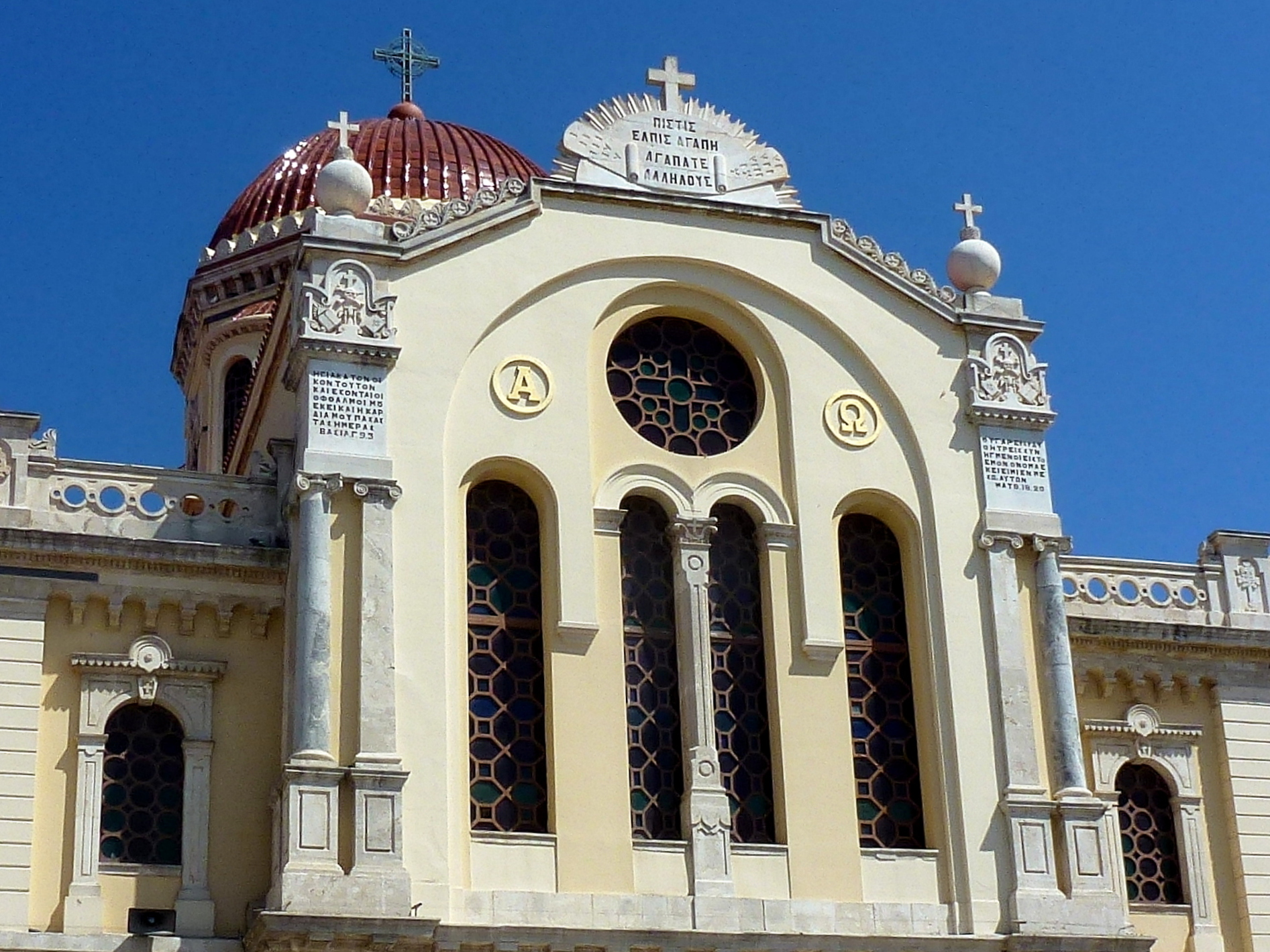 Ausschnitt aus der Westfassade, mit Inschrift